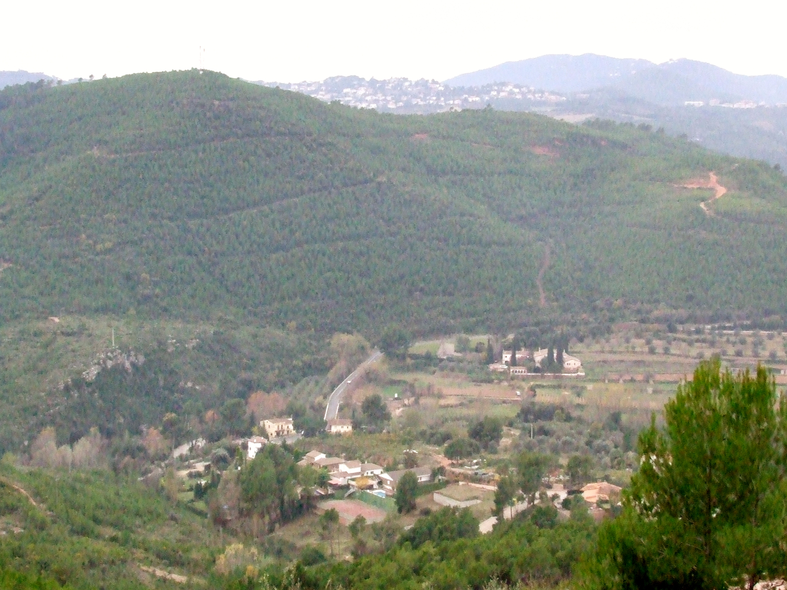 Els Tres Termes i Baga de Can Camp (Riells del Fai, Bigues i Riells, Vallès Oriental)